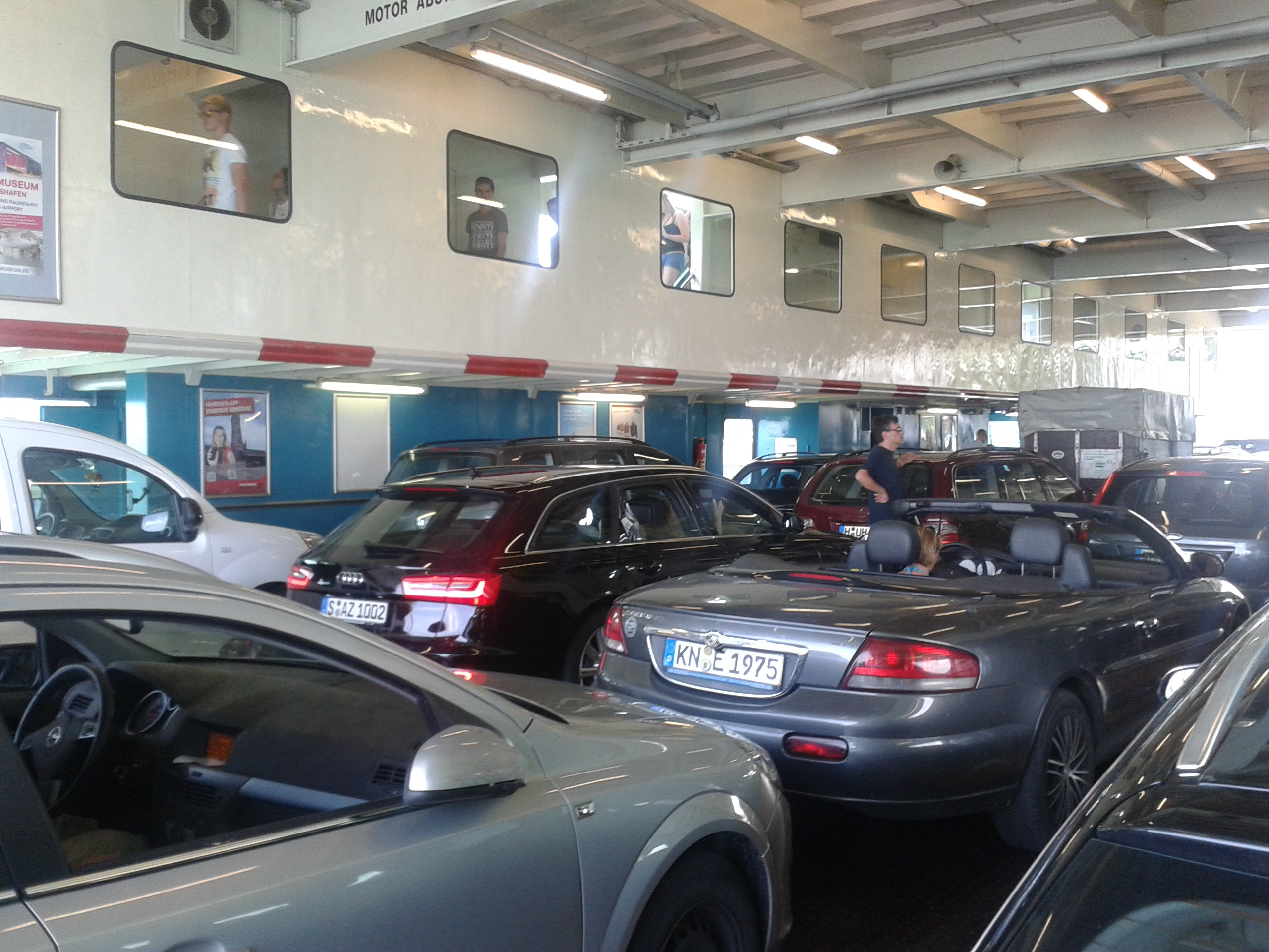 Konstanz-Meersburg ferry